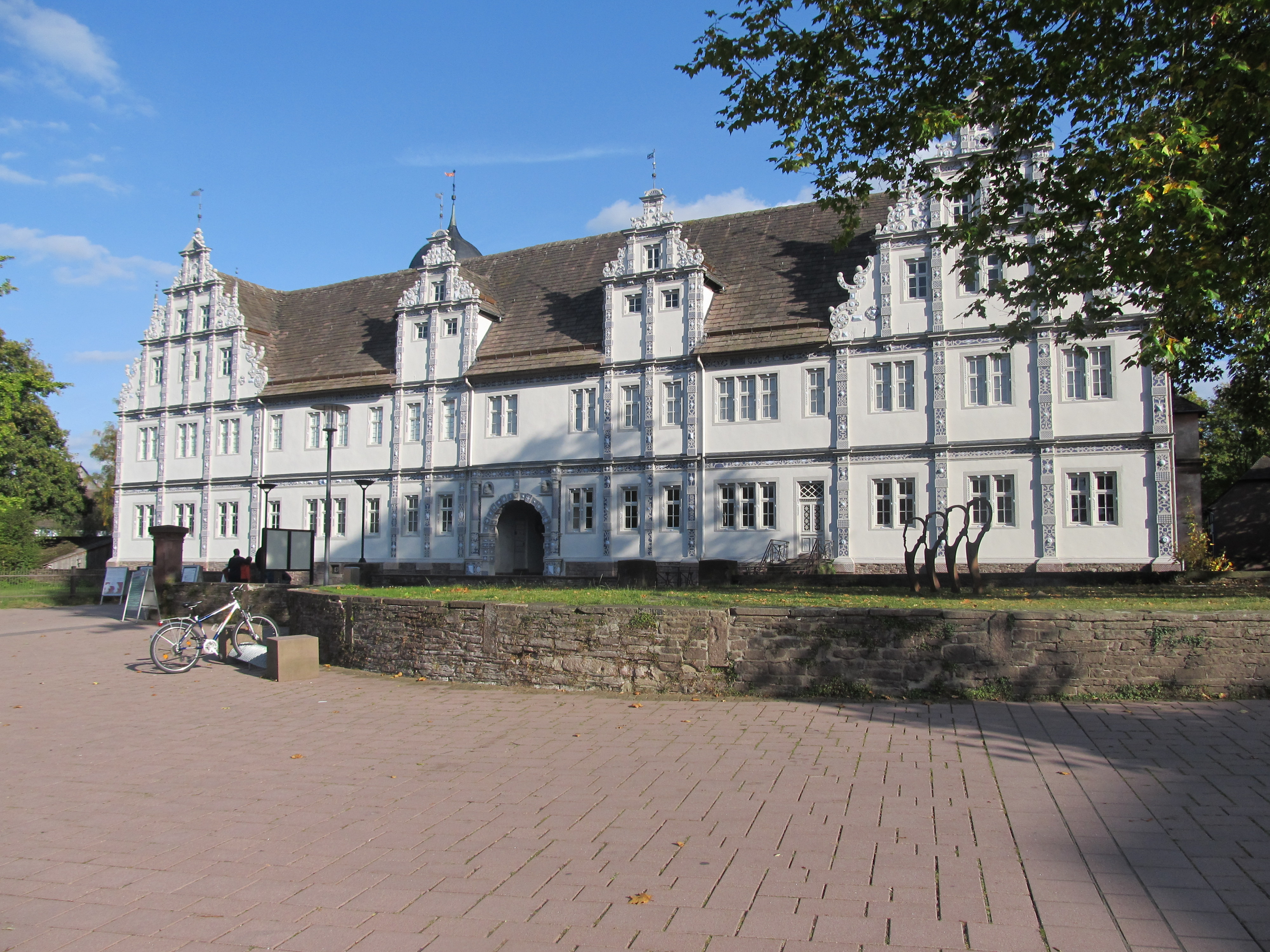 Schloss Bevern im Landkreis Holzminden nach der Restaurierung.